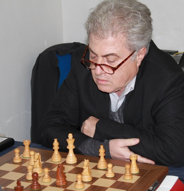 Bachar Kouatly jugant amb el Club Escacs Figueres a la Divisió d'Honor de la Lliga Catalana d'Escacs